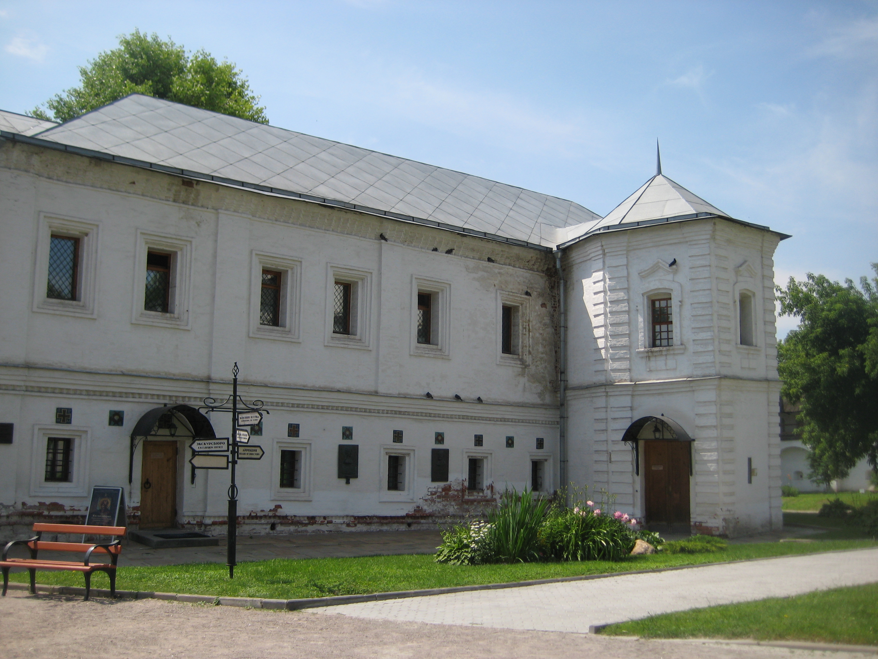 Андроников монастырь